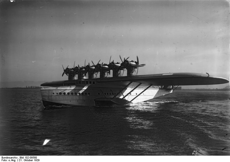 Der Weltrecordflug des Dornier-Riesenflugbootes "Do X" mit 169 Paasagieren in Altenrhein a/B. Der Start des Riesenflugbootes "Do X" zu dem Recordflug mit 169 Personen an Bord auf dem Bodensee bei Altenrhein.